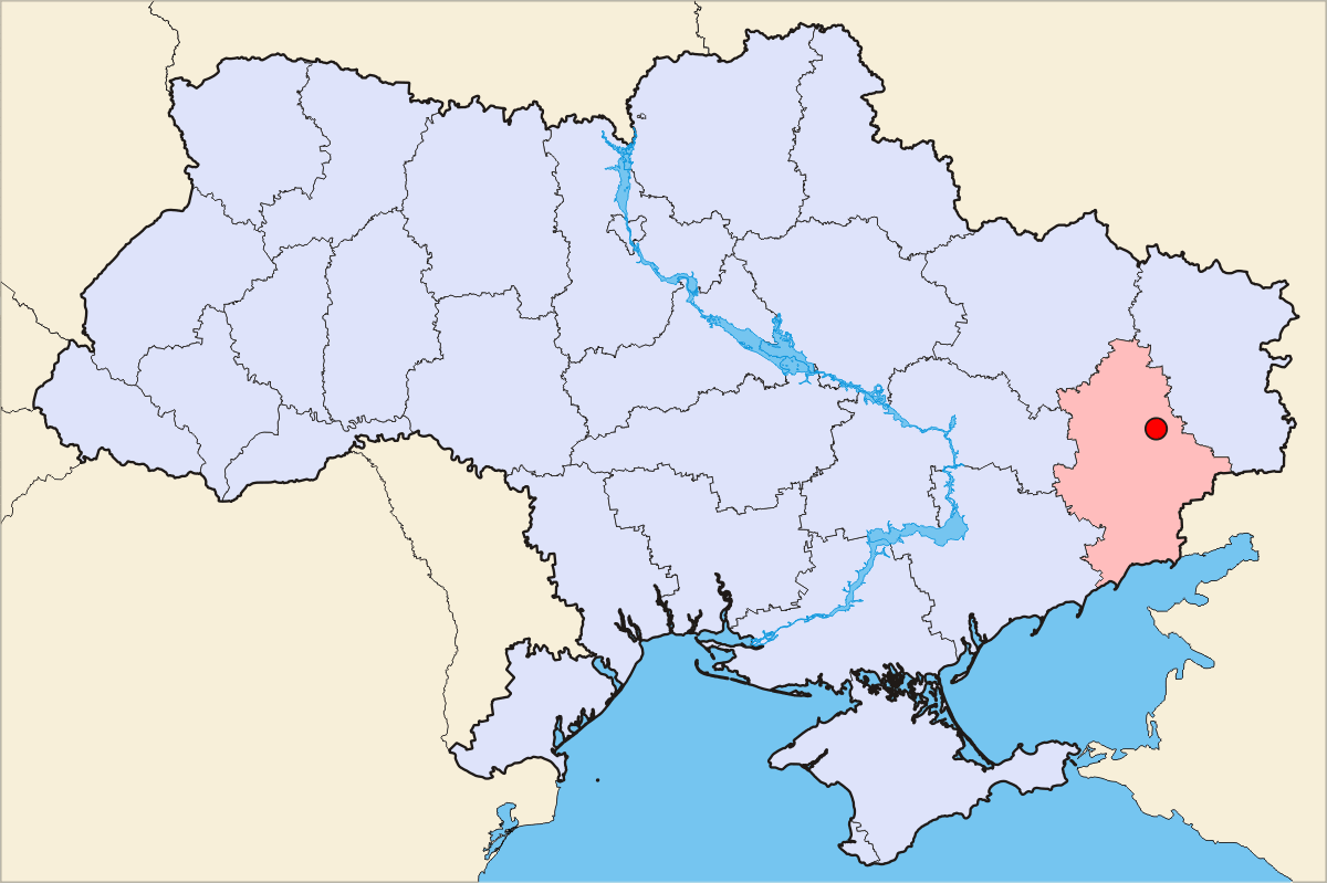 Based on Image:Donezk-Ukraine-Map.png by User:Skluesener.